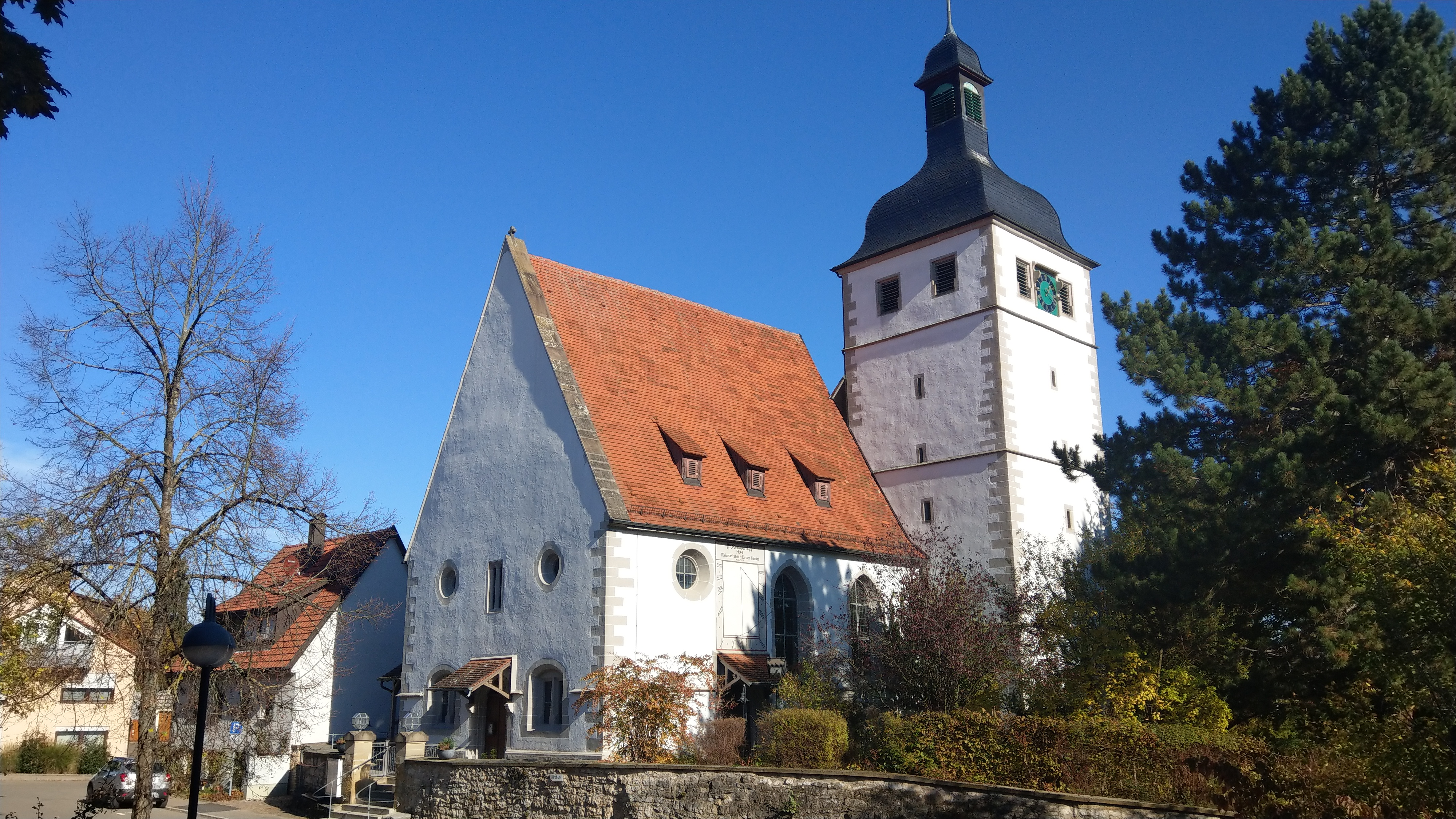 Evangelische Kirche